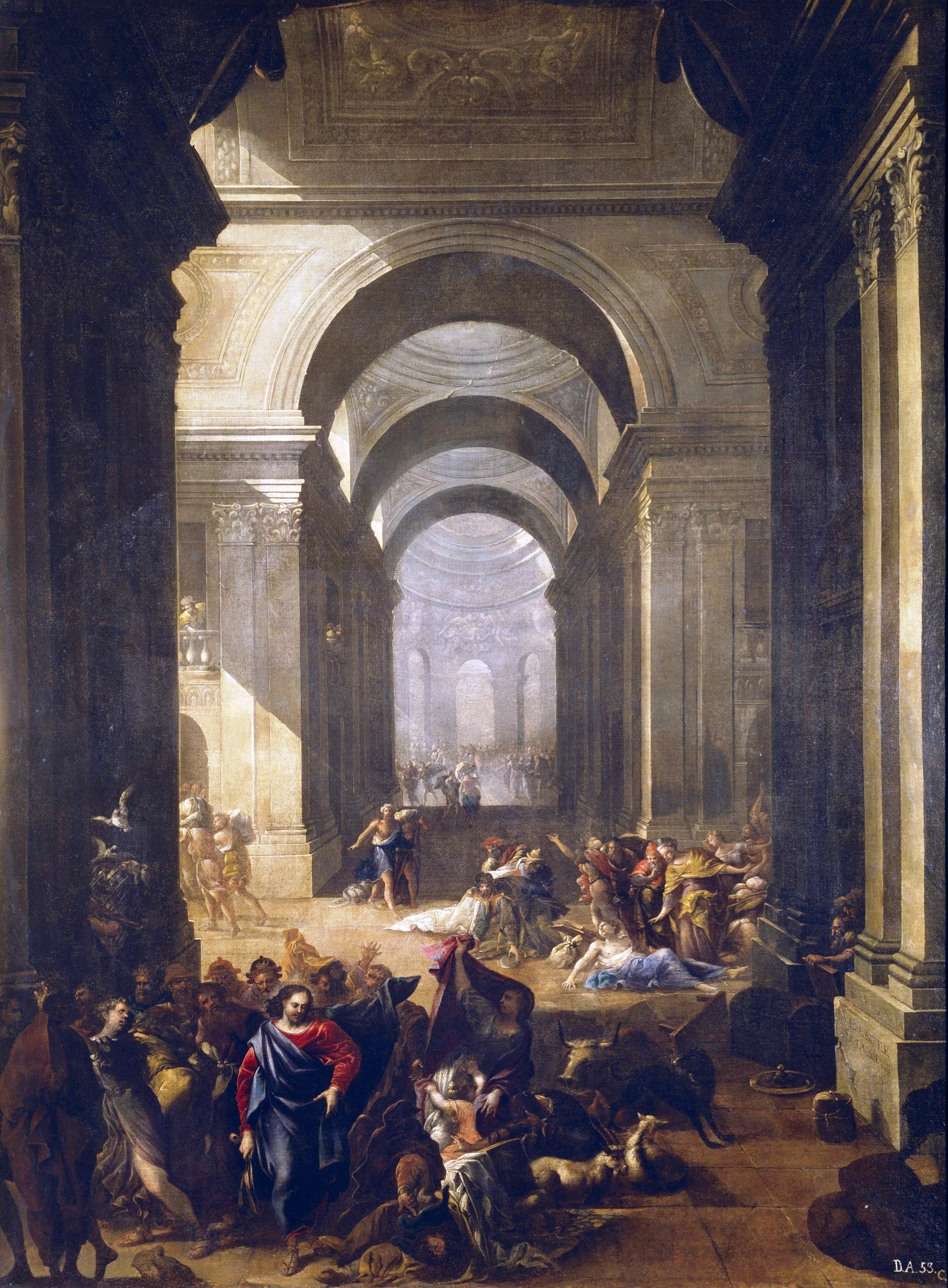 La obra representa a Jesucristo expulsando a los mercaderes del Templo de Jerusalén.